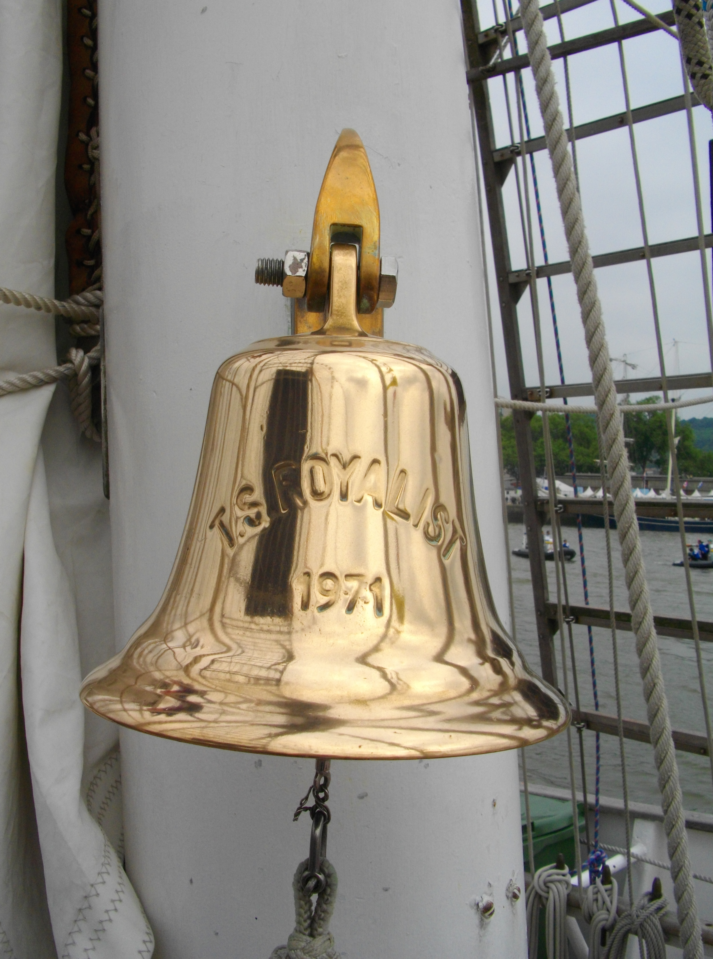 le brick britannique TS Royalist ( Armada Rouen 2013)